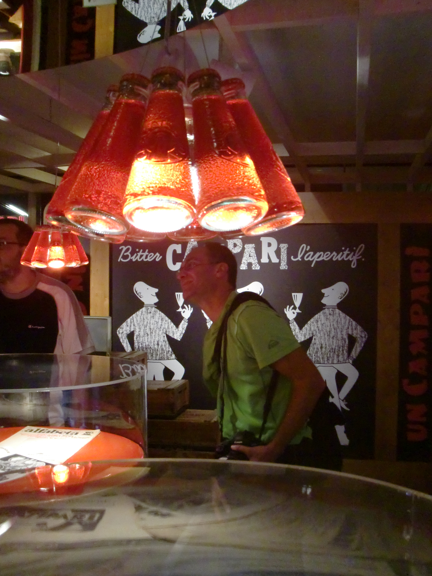 Galleria Campari Dal 23 marzo 2010 è aperta a Sesto San Giovanni la Galleria Campari nella storica sede sestese dello stabilimento. L'inaugurazione è stata l'occasione per celebrare 150 anni di storia di Campari. La Galleria è un laboratorio permanente, multimediale e sensoriale che racconta la storia del marchio attraverso l’arte moderna e contemporanea. Una storia fatta di brillanti intuizioni, di campagne pubblicitarie, di immagini da collezione. La Galleria Campari è un luogo della memoria, ma anche un luogo del presente. Alcune opere esposte, infatti, sono state reinterpretate e animate con tecnologie multimediali, in modo da percepirle anche attraverso l’olfatto e l’udito, vivendo un’esperienza sensoriale completa. La sede, che risale al 1904, è stata ristrutturata dall’architetto Mario Botta nel 2009. Si estende su due piani, il primo dedicato all’esperienza Campari con l’esposizione di opere di artisti internazionali come Leonetto Cappiello, Bruno Munari e Ugo Nespolo. Al secondo piano il prodotto ritorna visibile, tangibile e reale, con oltre 4.000 gocce di Campari pendono dal soffitto. La narrazione si sviluppa lungo 5 stanze dove il visitatore si perde nel tempo e nello spazio del mondo Campari, il percorso si snoda attraverso oggetti tipici del mondo dei bar, shaker, bicchieri, menu, posacenere, vassoi, bottiglie, orologi originali degli anni ’60 e ’70: tanto, tanto design! This is a photo of a monument which is part of cultural heritage of Italy.